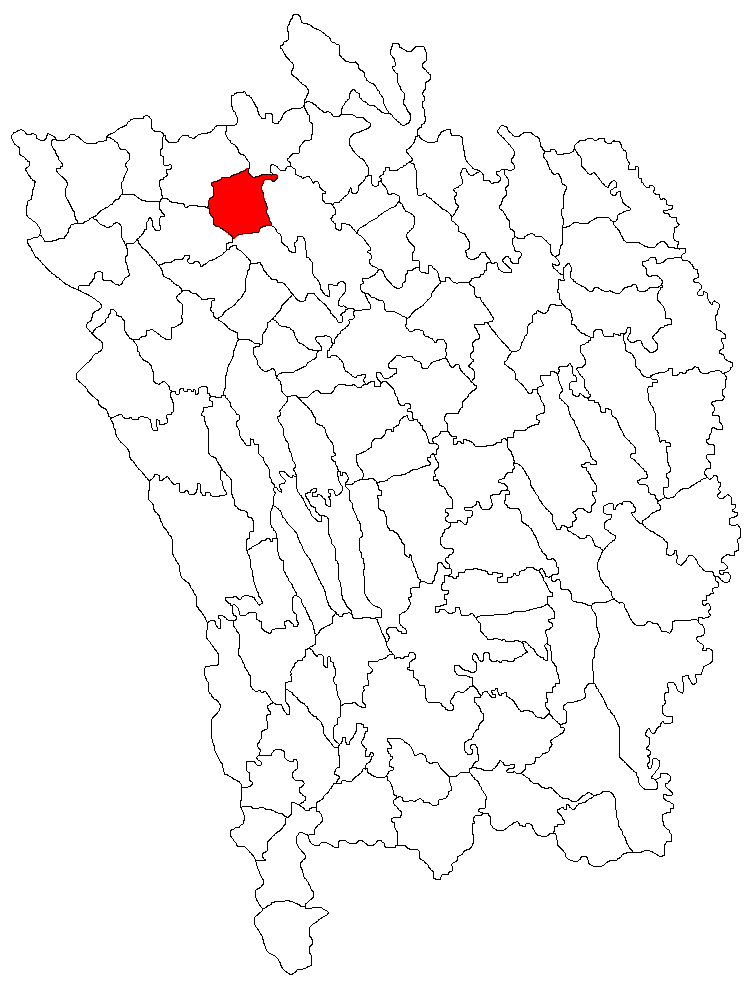 Categorie:Hărţi ale judeţului Vaslui